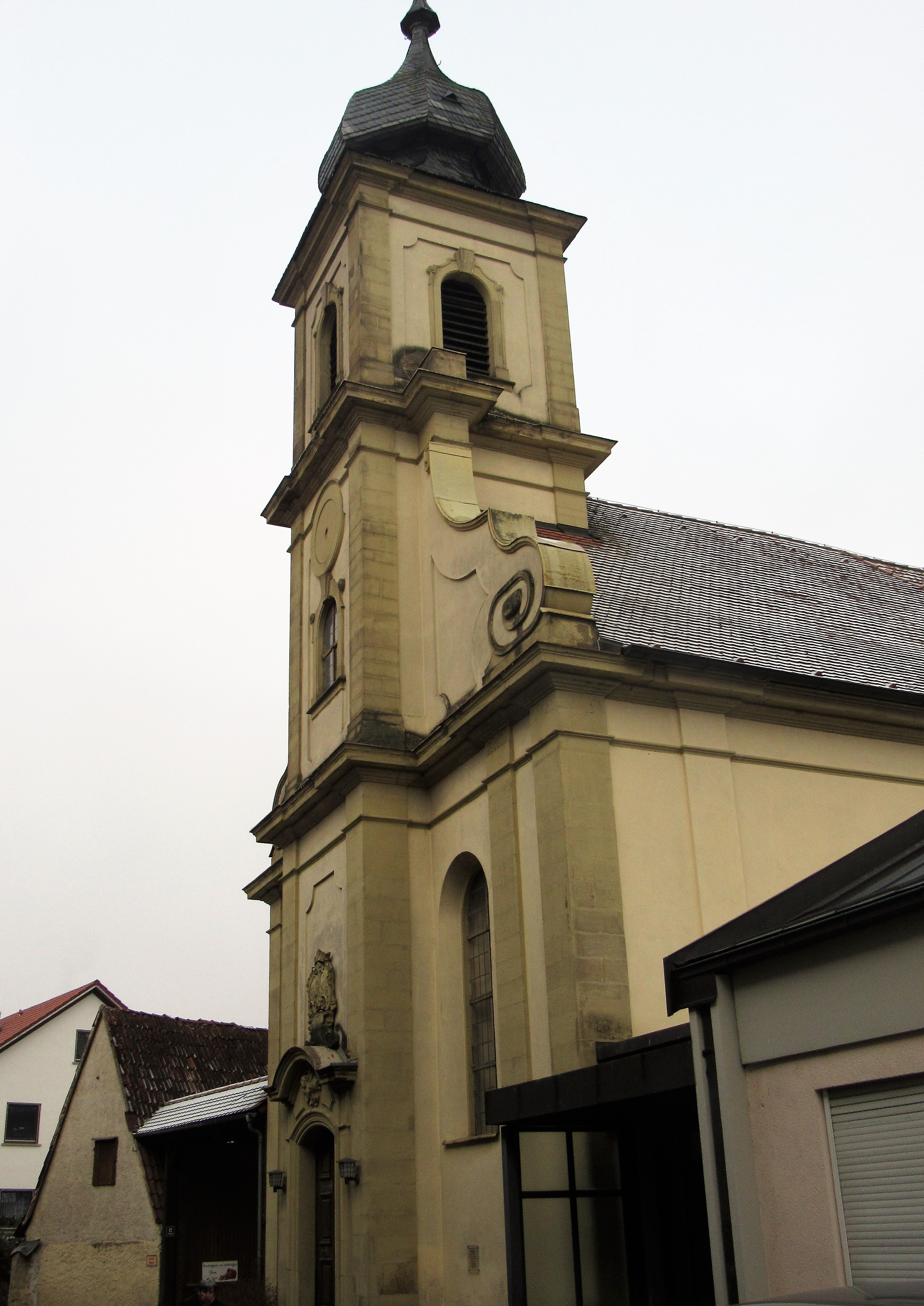 Kirche St. Michael in Euerbach